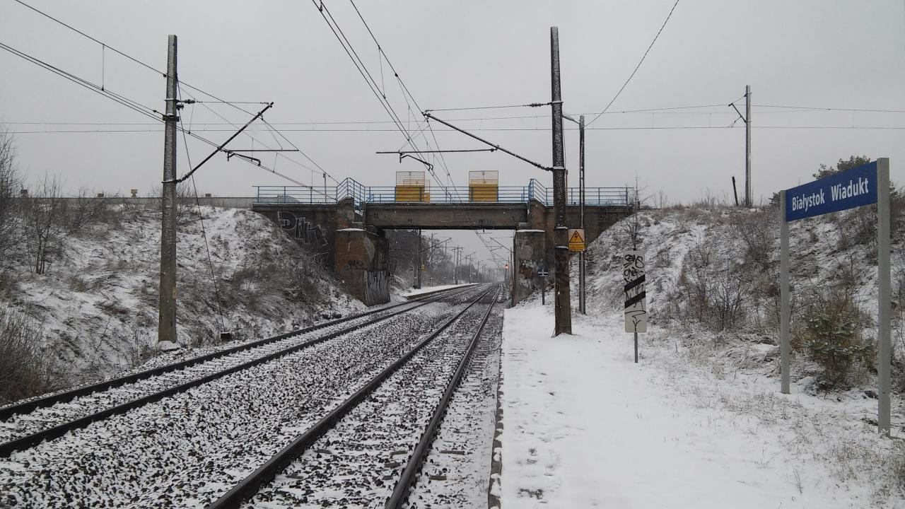 Peron drugi